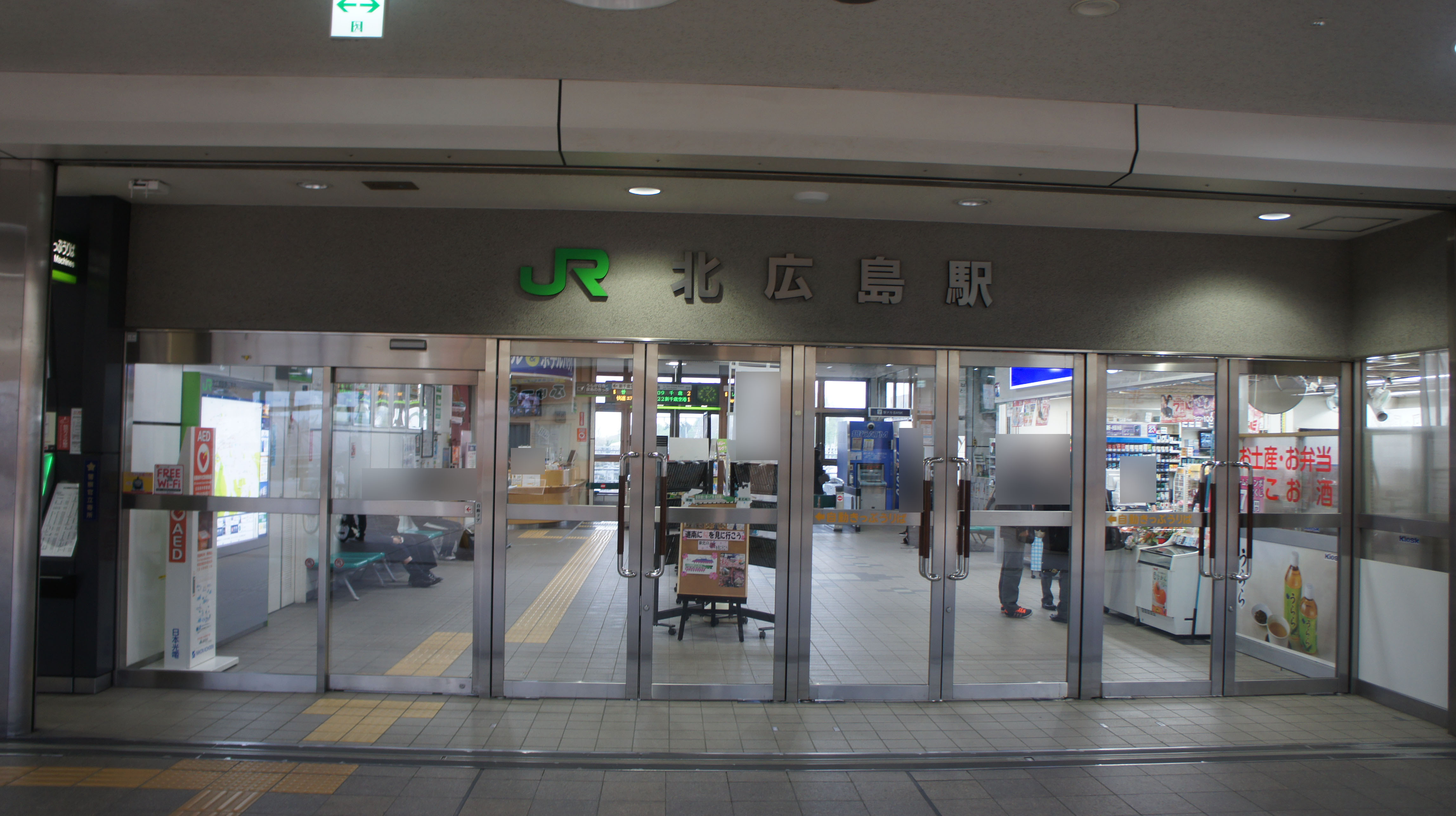 JR千歳線・北広島駅出入口 Sony NEX-3